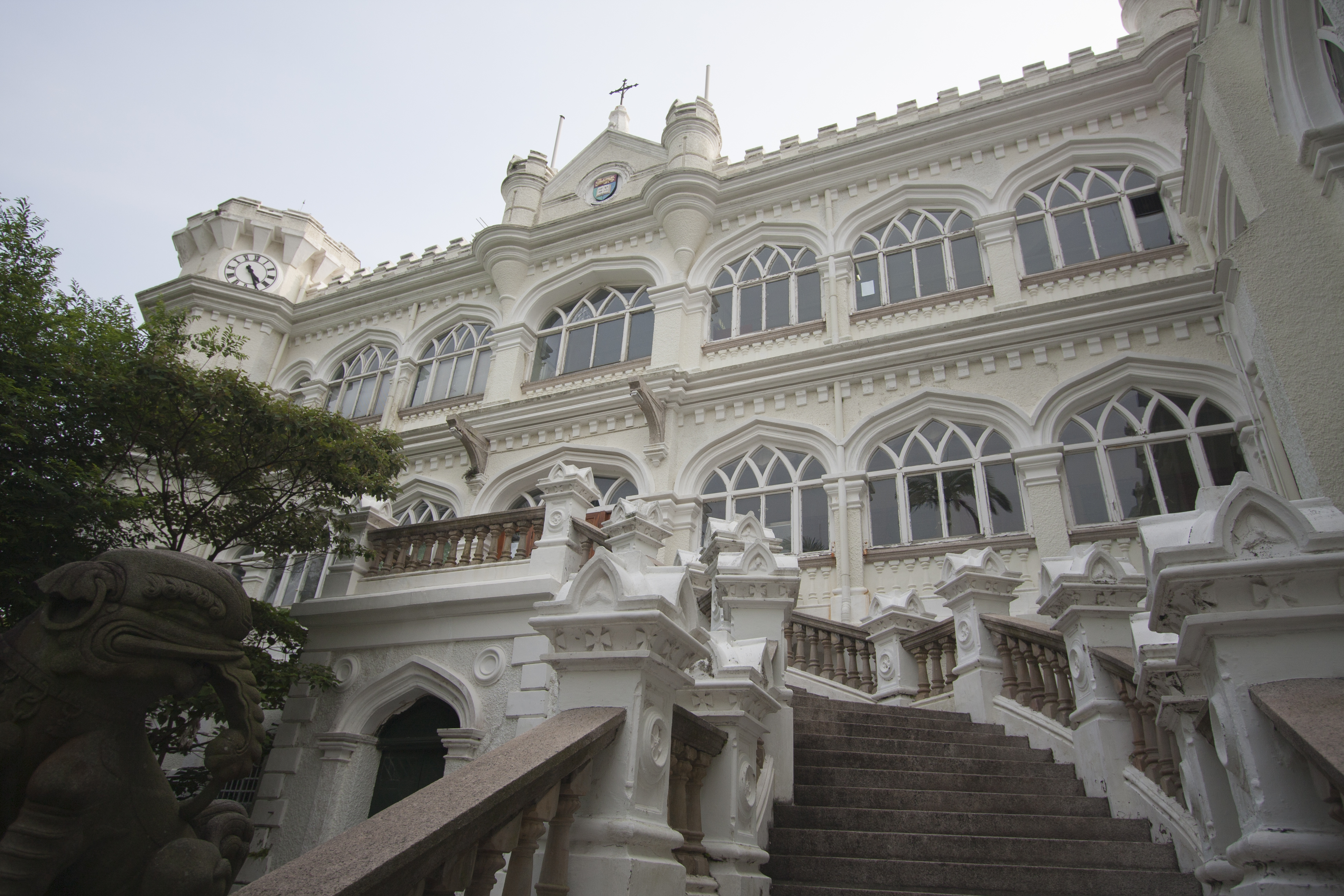 大學堂外牆為香港法定古跡